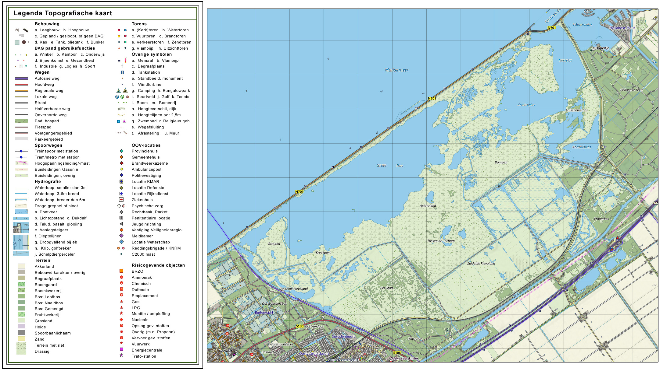 Topografische kaart van de Oostvaardersplassen. Op basis van de GML open geodata van de BRT/Top10NL (basisregistratie Topografie, Kadaster 2011), vrijgegeven door Kadaster onder de Creative Commons BY licentie. Samenstelling en kleurenschema: Jan-Willem van Aalst, met QuantumGIS en Photoshop.